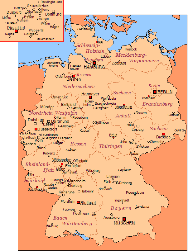 Deutschlandkarte mit den wichtigsten Städten. Eingetragen sind: alle Städte, die mindestens 100.000 Einwohner haben (Großstädte; Stand: 2003), alle Städte, die in der Vergangenheit mindestens 100.000 Einwohner hatten alle Städte, die Hauptstadt eines Regierungsbezirkes sind